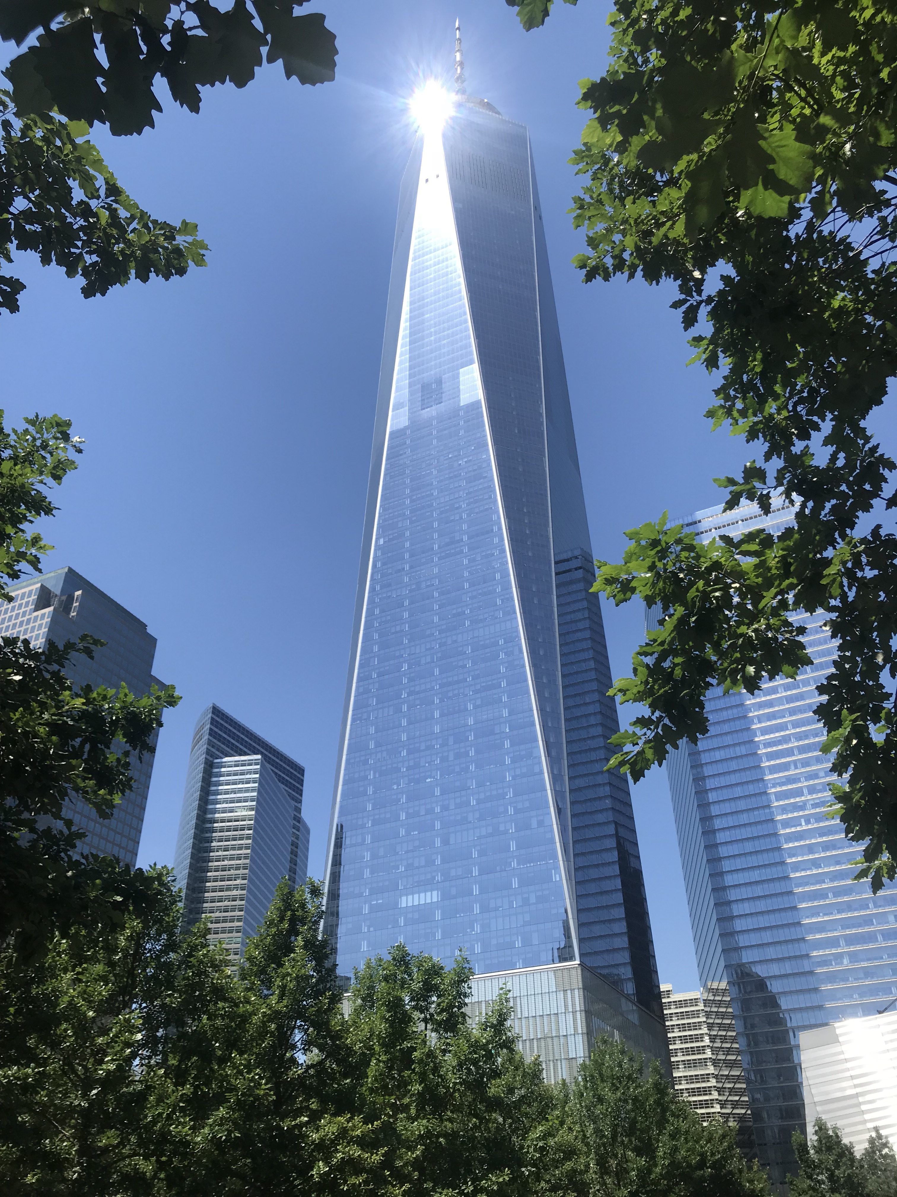 One World Trade Center